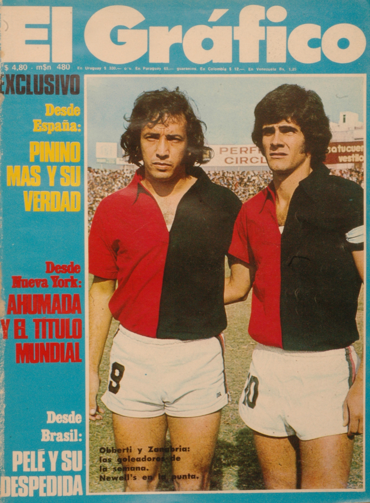 El Grafico del 07 de Mayo de 1974. Edicion 2848